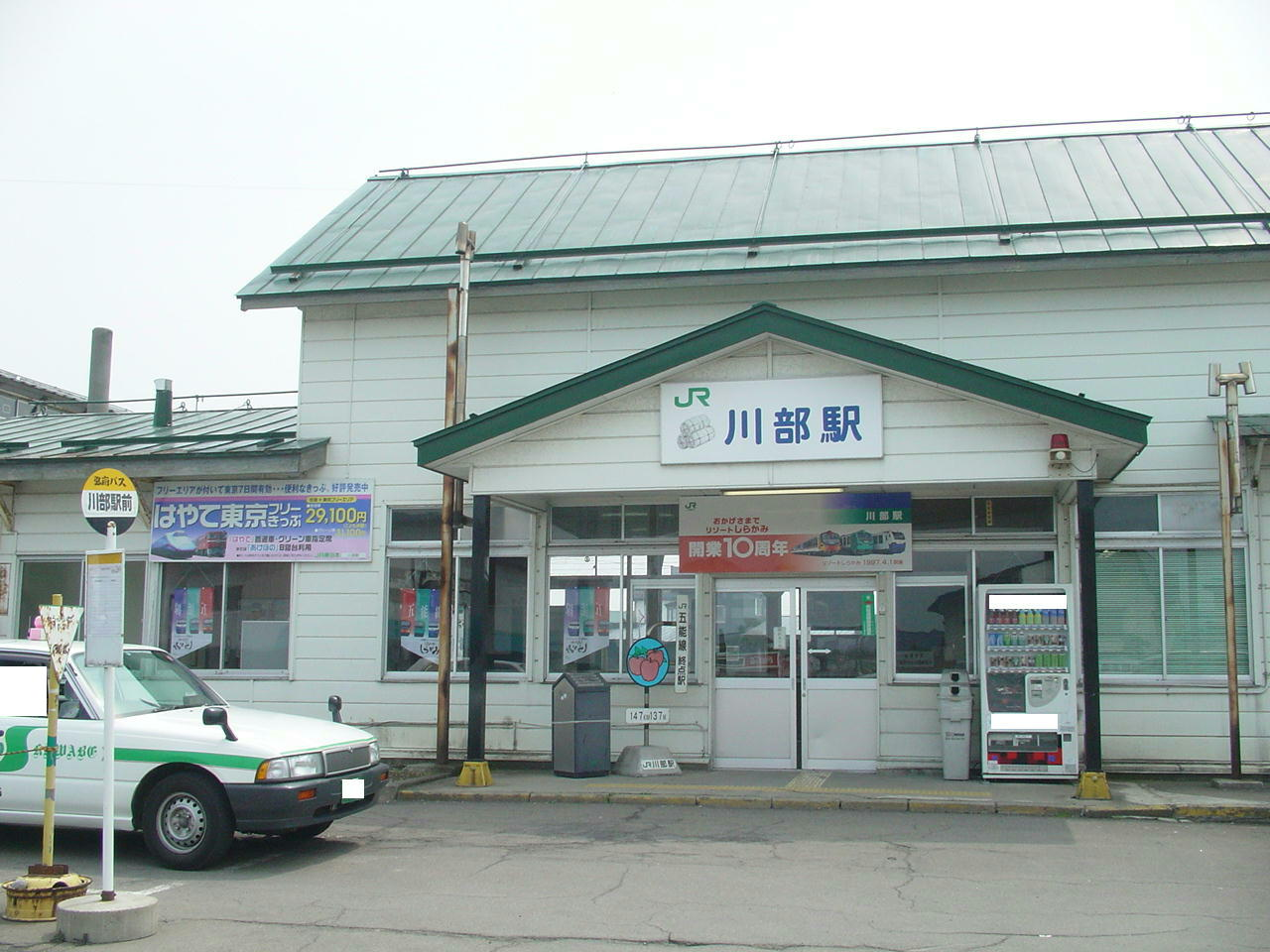 （川部駅）